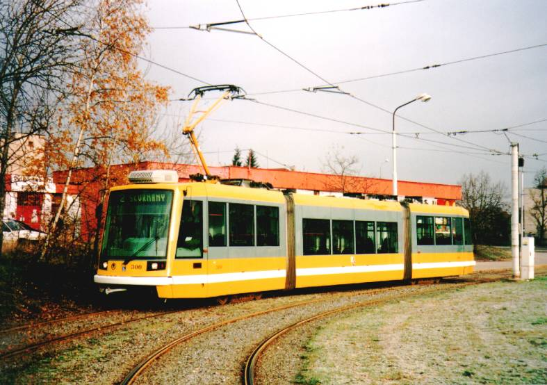 Prototyp vozu Škoda 03T v Plzni (Světovar)